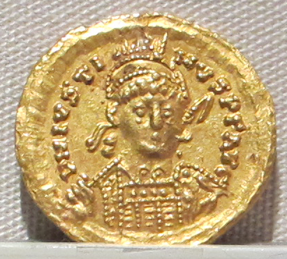 Palazzo Massimo alle Terme